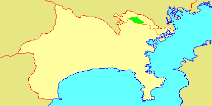 Map of Miyamae-ku, Kawasaki, Kanagawa-prefecture, Japan